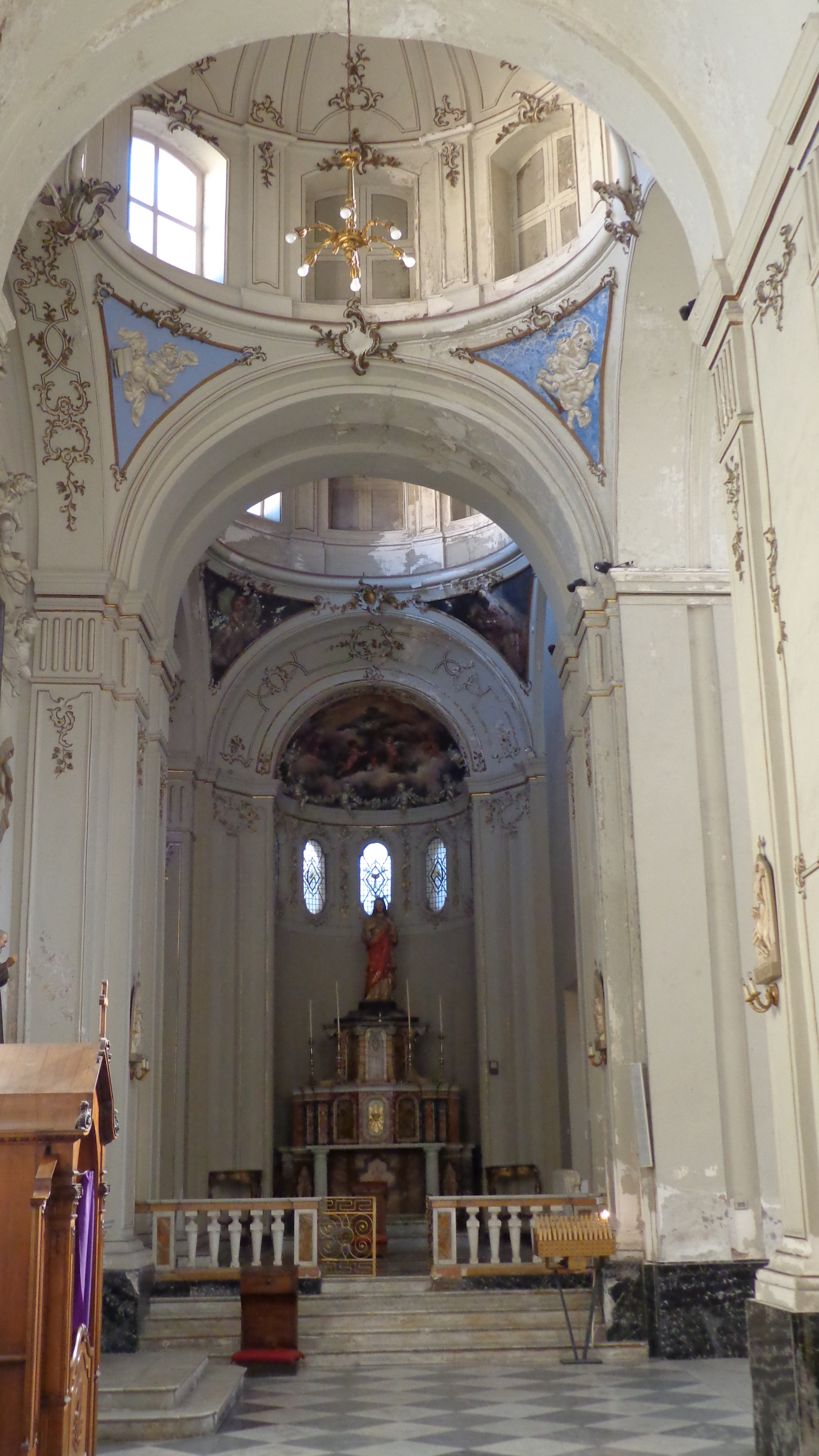 Abside minore